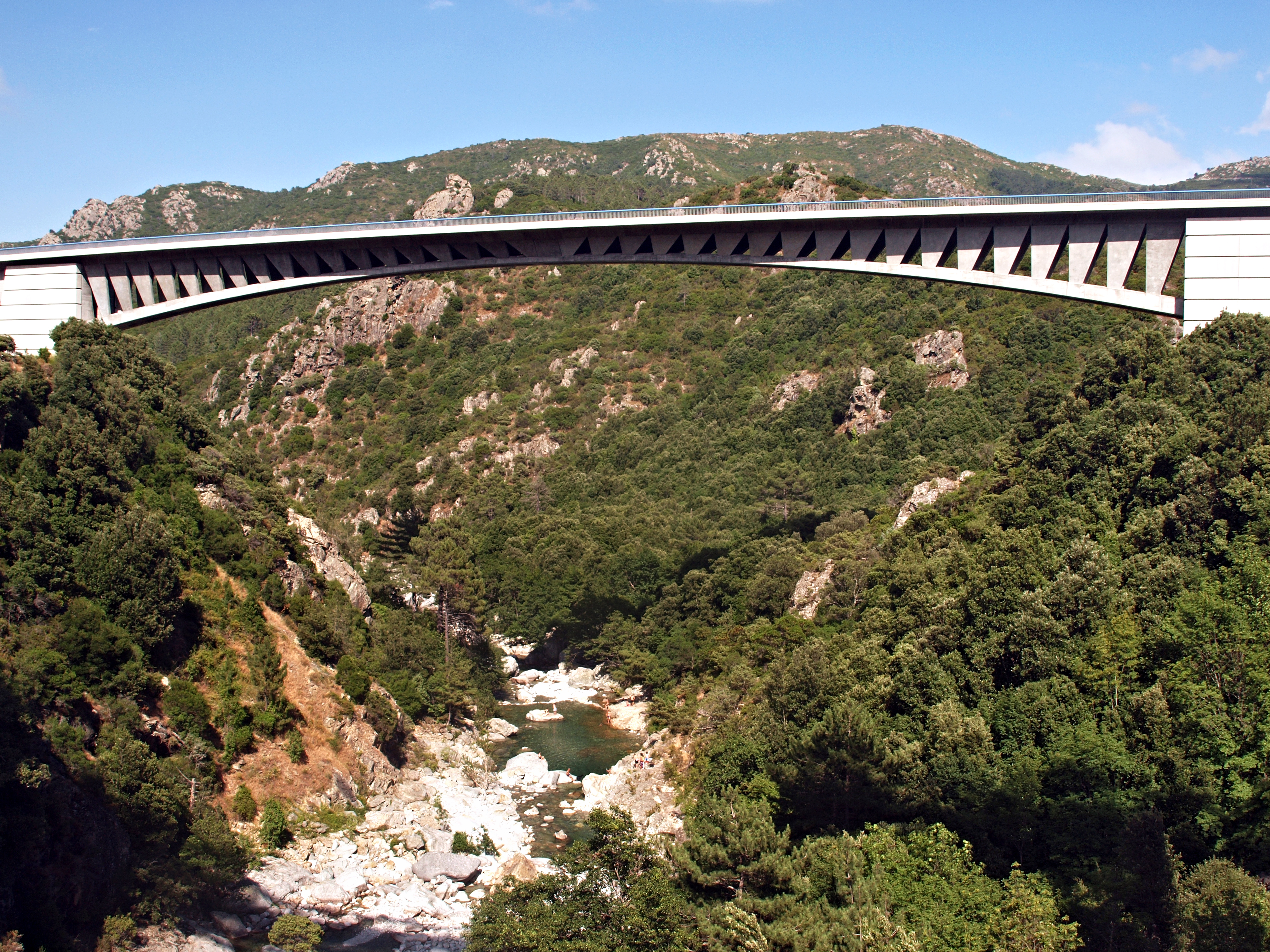 Venaco - Vivario, Centre Corse (Haut-Corse) - Le Pont Baggioni, nouveau pont de la RT 20 (ex RN 193) sur le Vecchio